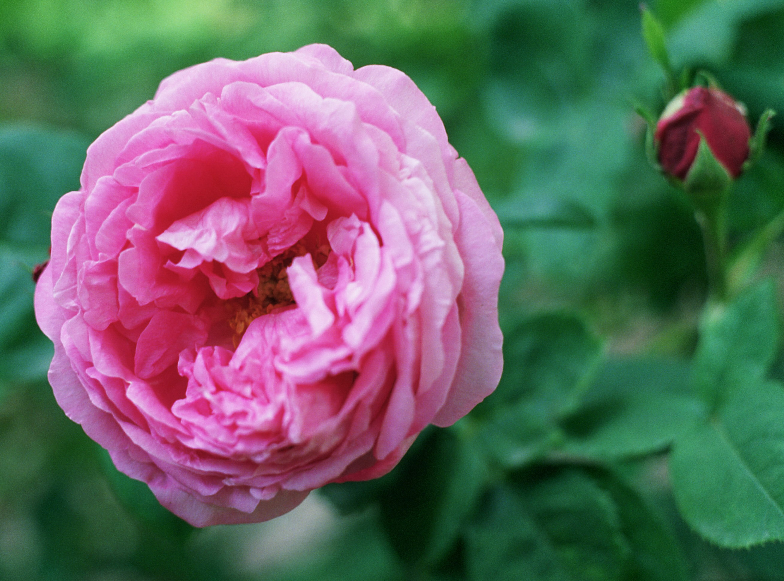 Rosa 'La Reine', Híbridos reflorecientes, sect. Rosa. Real Jardín Botánico, Madrid